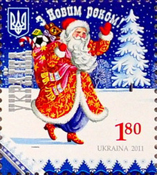 Новогодние марки с Дедом Морозом. Украина